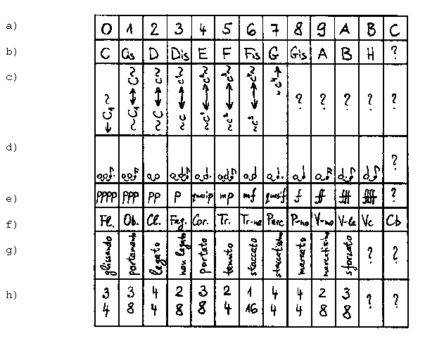 Primaarsetes parameetrites loodud ridu siduv tabel: a) rea elemendi number, b) rida helikõrguse parameetris (näide 1.1), c) rida registri parameetris (näide 2), d) rida kestuse parameetris (näide 3.2), e) rida helitugevuse parameetris (näide 4), f) rida tämbri parameetris (näide 5), g) rida artikulatsiooni parameetris (näide 6), h) rida taktimõõdu parameetris (näide 7). Tabelis on lüngad, mis on tähistatud küsimärgiga. Lüngad tulenevad sellest, et erinevates parameetrites loodud ridade elementide arv on tulenevalt parameetri spetsiifikast erinev